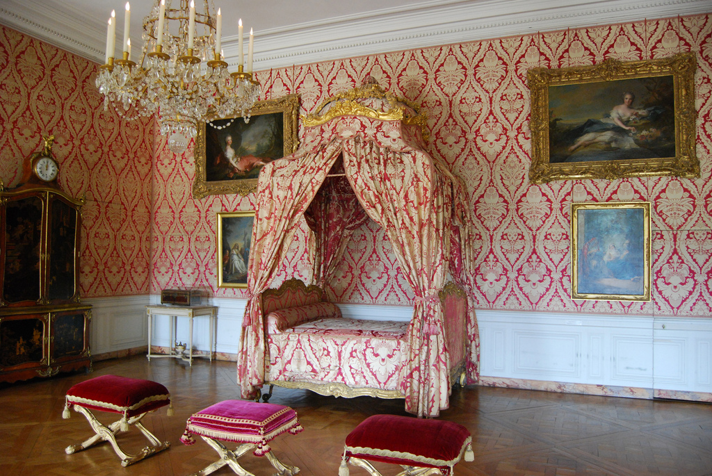 Nicolas Heurtaut (Français, 1720-1771): Lit à la polonaise, XVIIIe s., bois sculpté et doré.